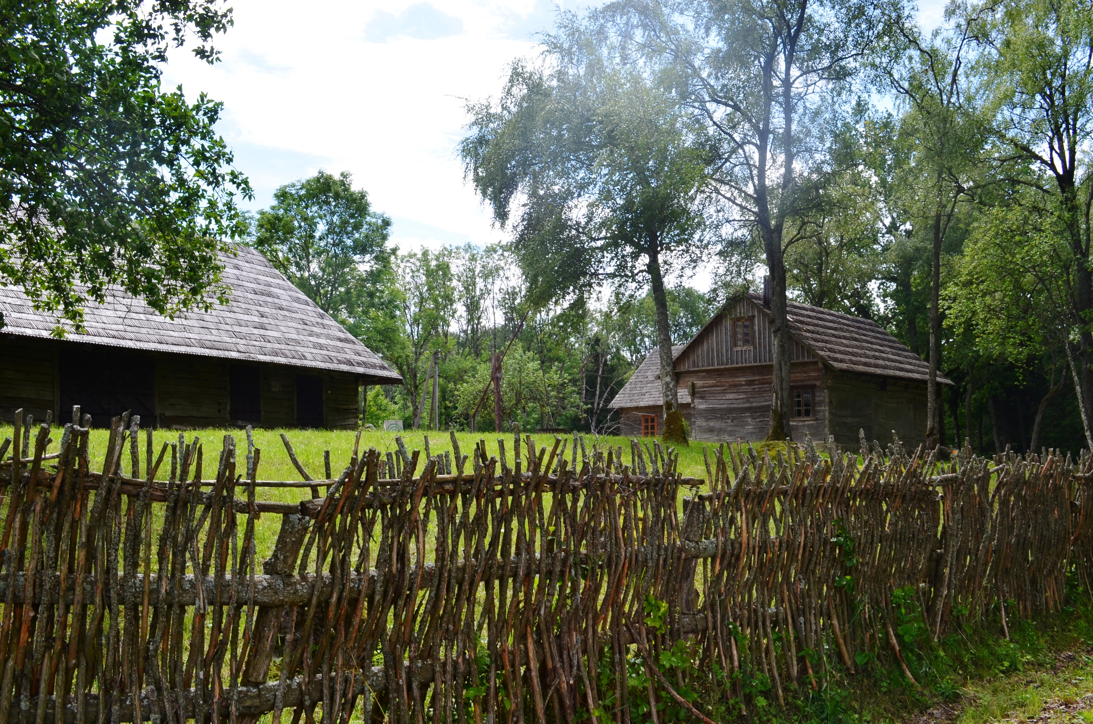 Etnografinė sodyba, Bilioniai, Šilalės r. Žemaitėška: Senuobėnė suoda Bėliuoniūs, Šėlalės raj.